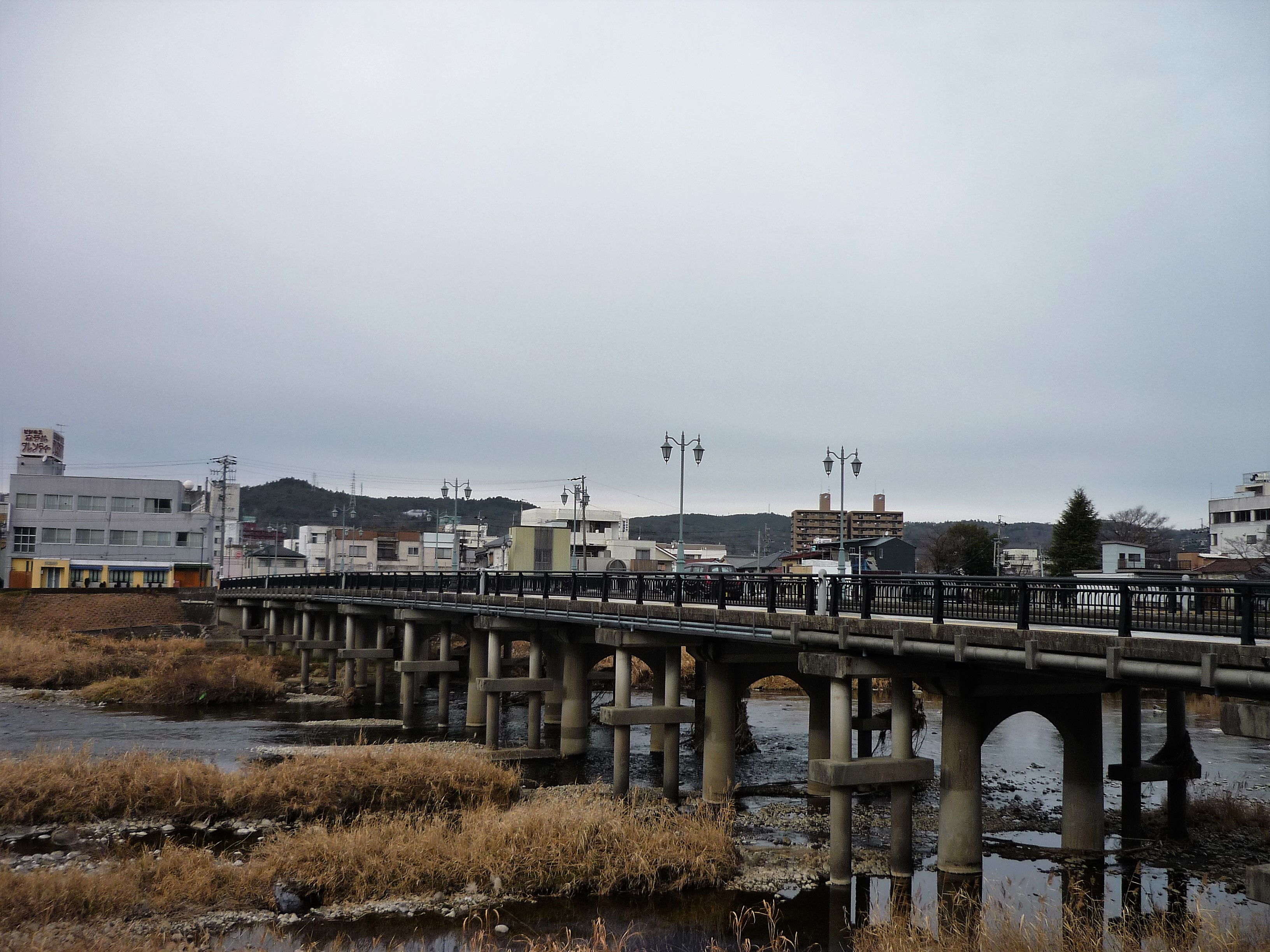 土岐市の土岐川にかかる中央橋 Panasonic Lumix DMC-FS3